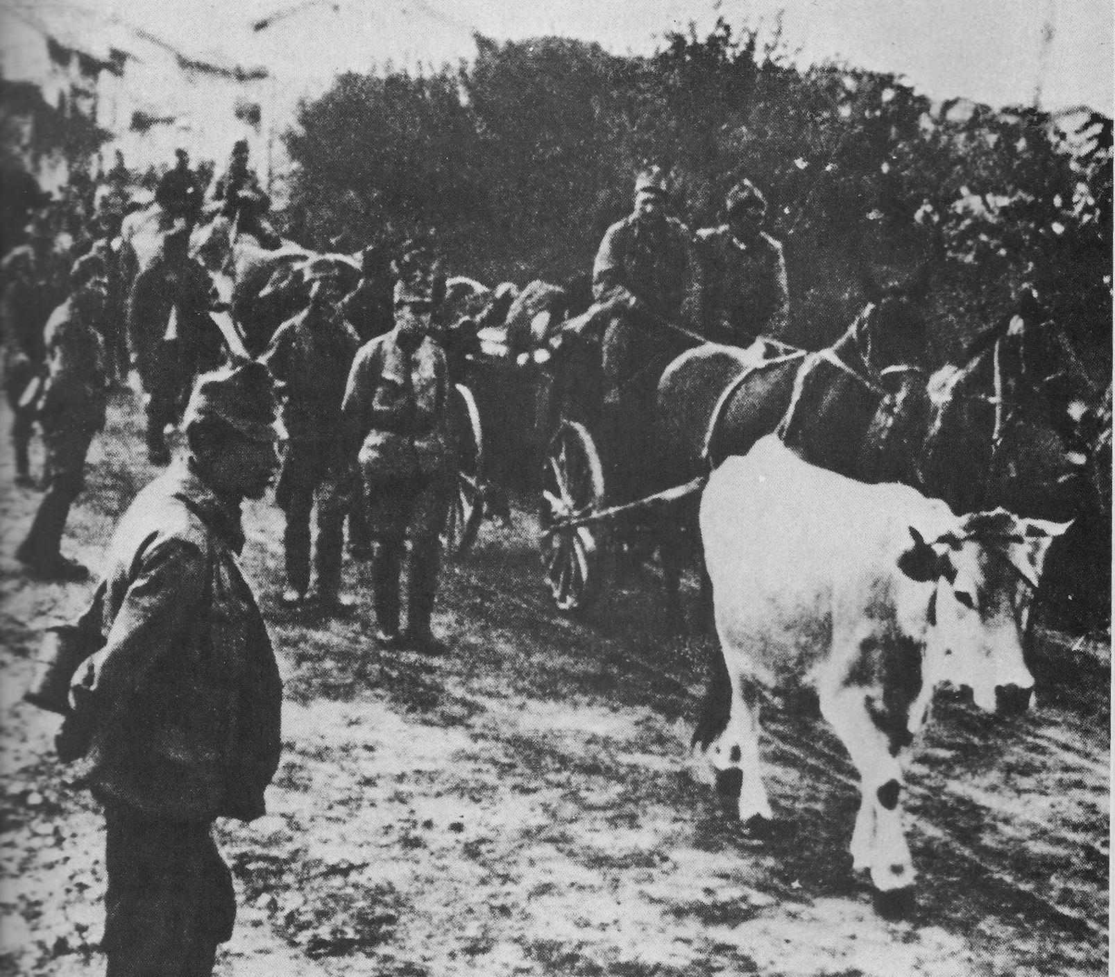 Truppe austro-ungariche in ritirata durante la battaglia di Vittorio Veneto